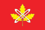 Флаг Костерёво Владимирской области